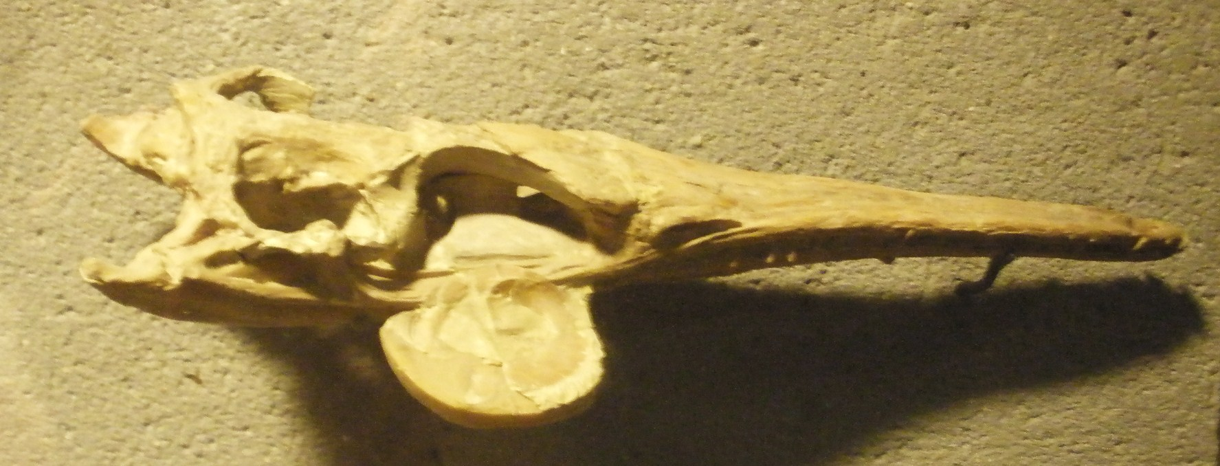 Fossil of Rhacheosaurus (formerly Geosaurus) gracilis, an extinct crocodile- Took the photo at Senckenberg Museum of Frankfurt